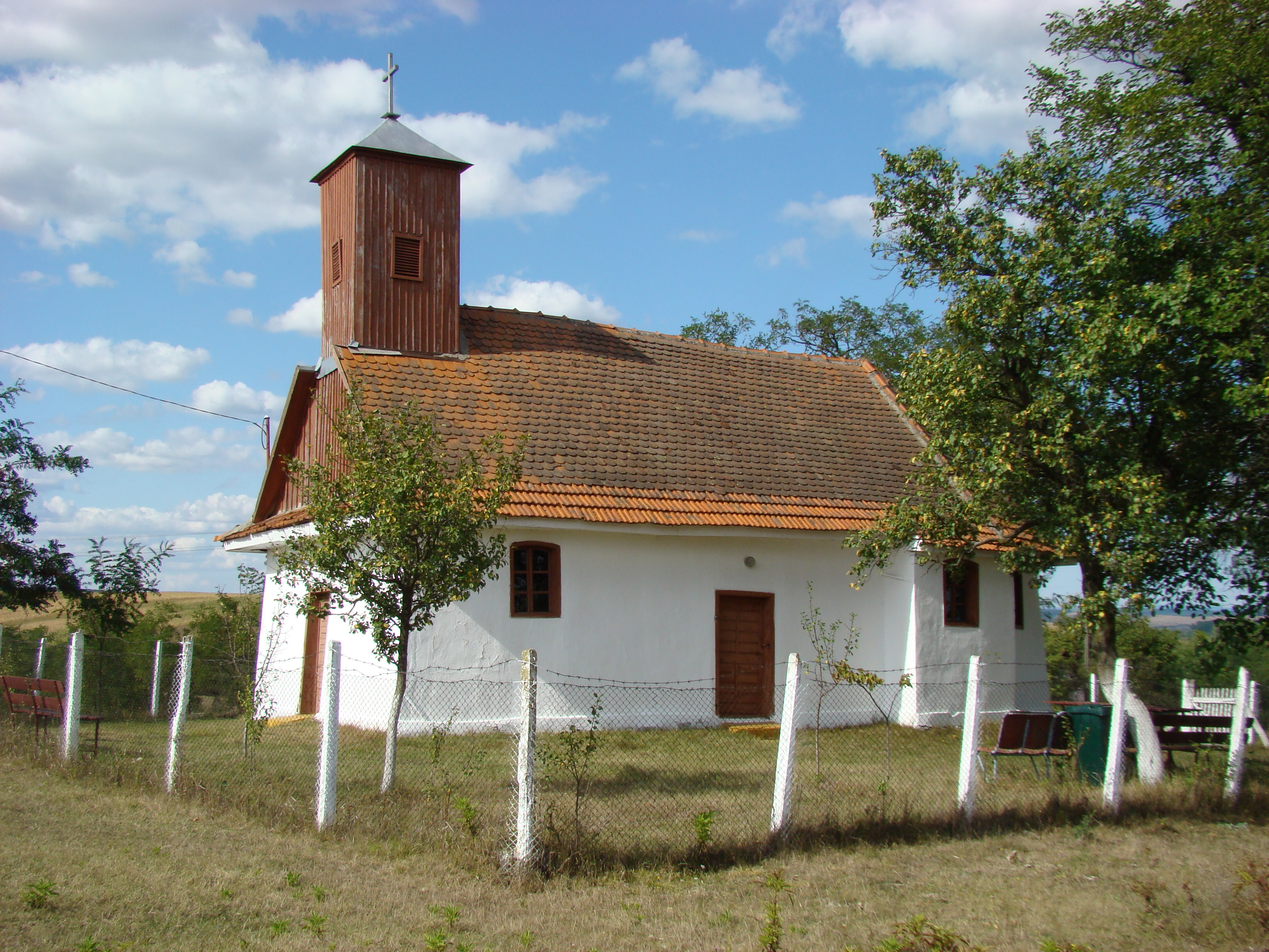 Serbian Orthodox church in Lucareț/Лукаревац, Romania